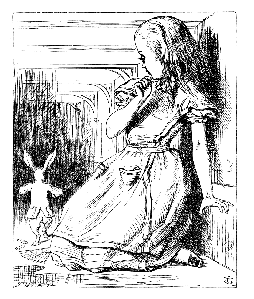 Illustration d'origine (1865), par John Tenniel (28 février 1820 – 25 février 1914), du roman de Lewis Carroll, Alice au pays des merveilles.